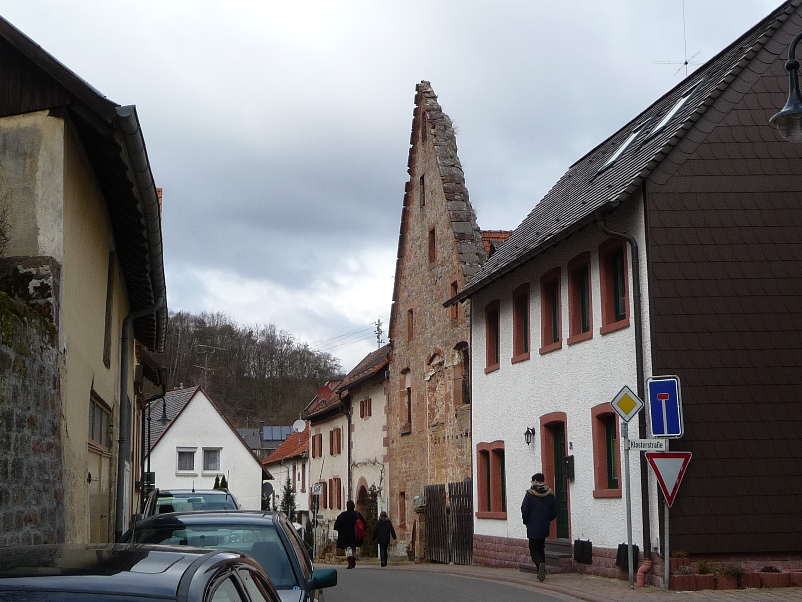 Höningen